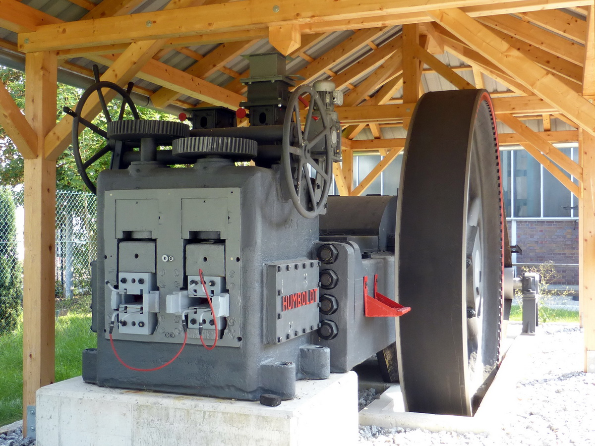 Brikettpresse in der Nähe der ehemaligen Braunkohlebrikettfabrik in Wackersdorf (Oberpfalz)